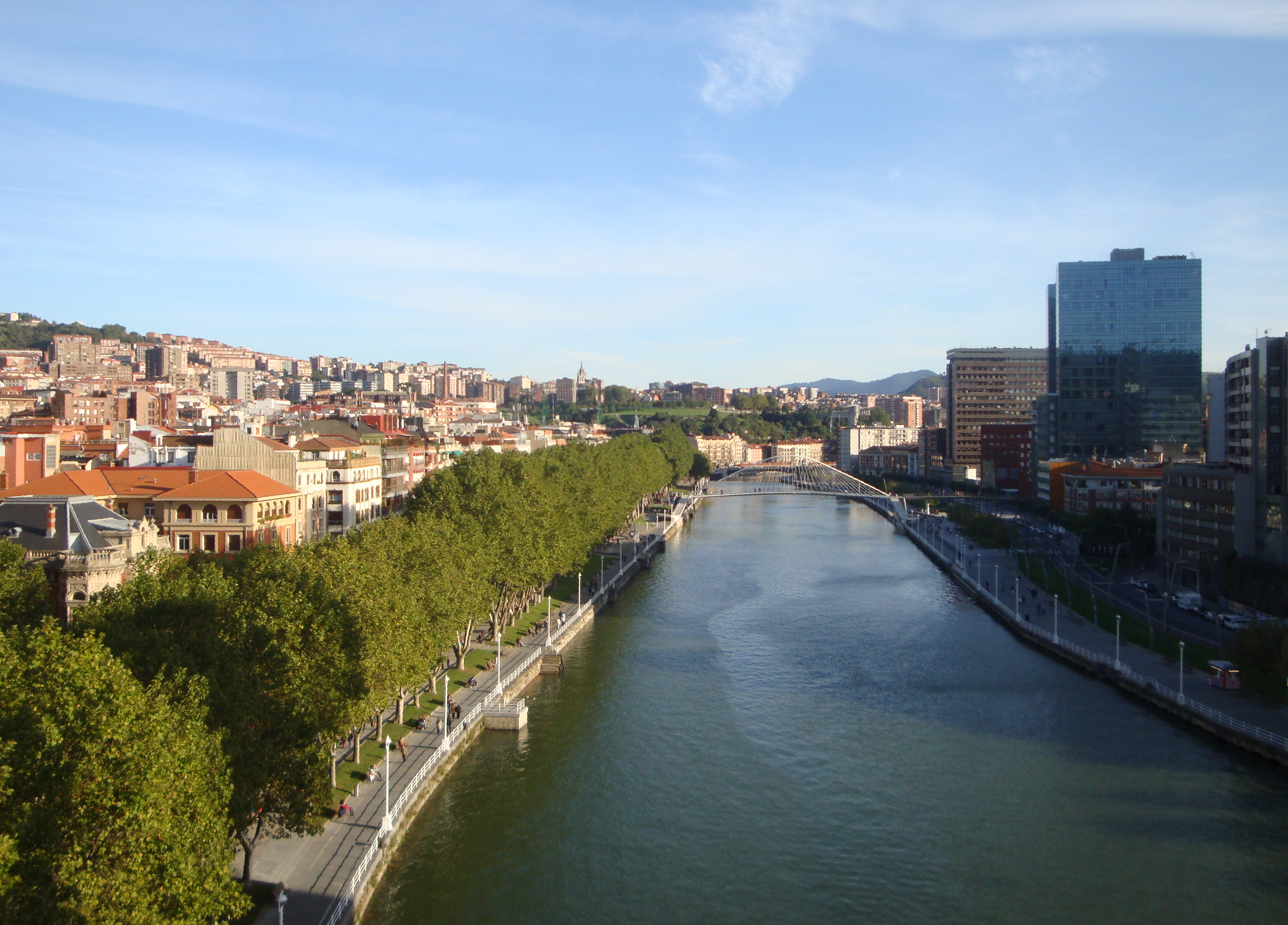 Bilboko ibaiaren ikuspegi orokorra